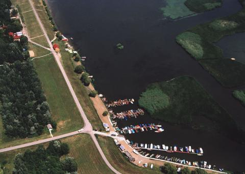 Sarud, Hungary, aerialphotography